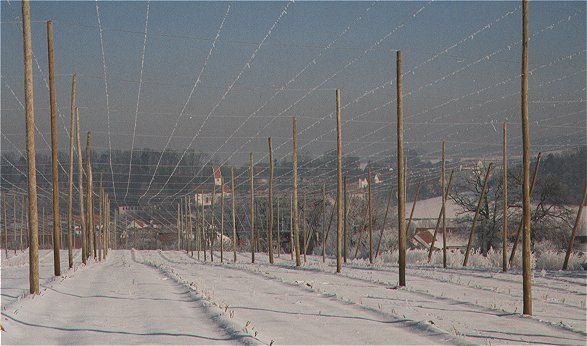 Hopfengarten in der Holledau